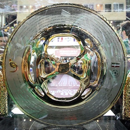 کاپ جام حذفی از ۱۳۹۵-۱۳۹۶ به بعد